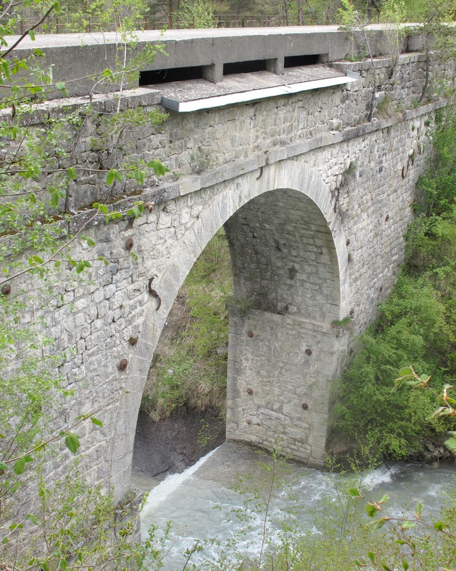 La partie centrale du pont-canal vue depuis la rive gauche, côté amont : tablier haut sur une arche plein cintre, le tout en maçonnerie.